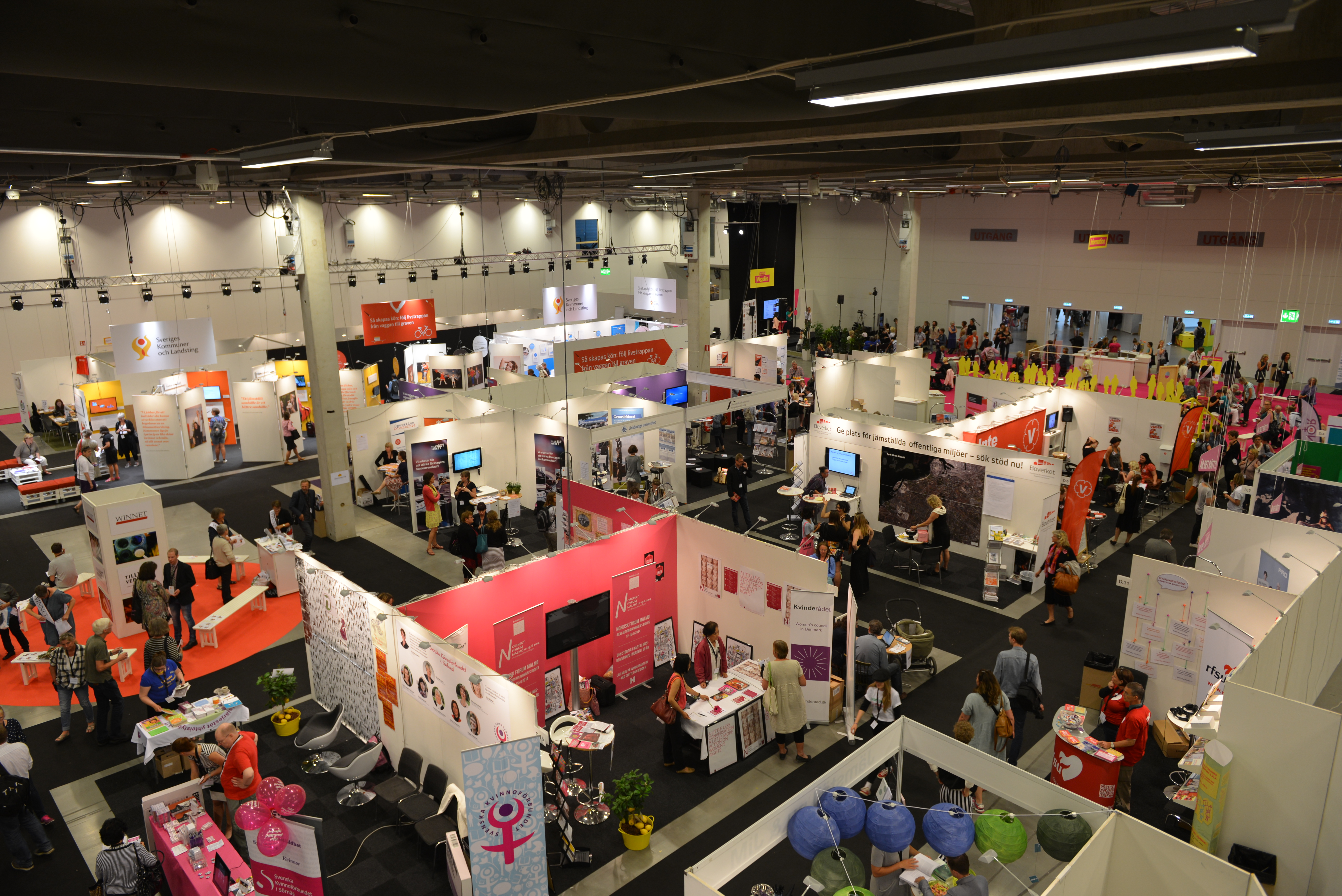 Nordiskt forum 2014, mässhallen från ovan.